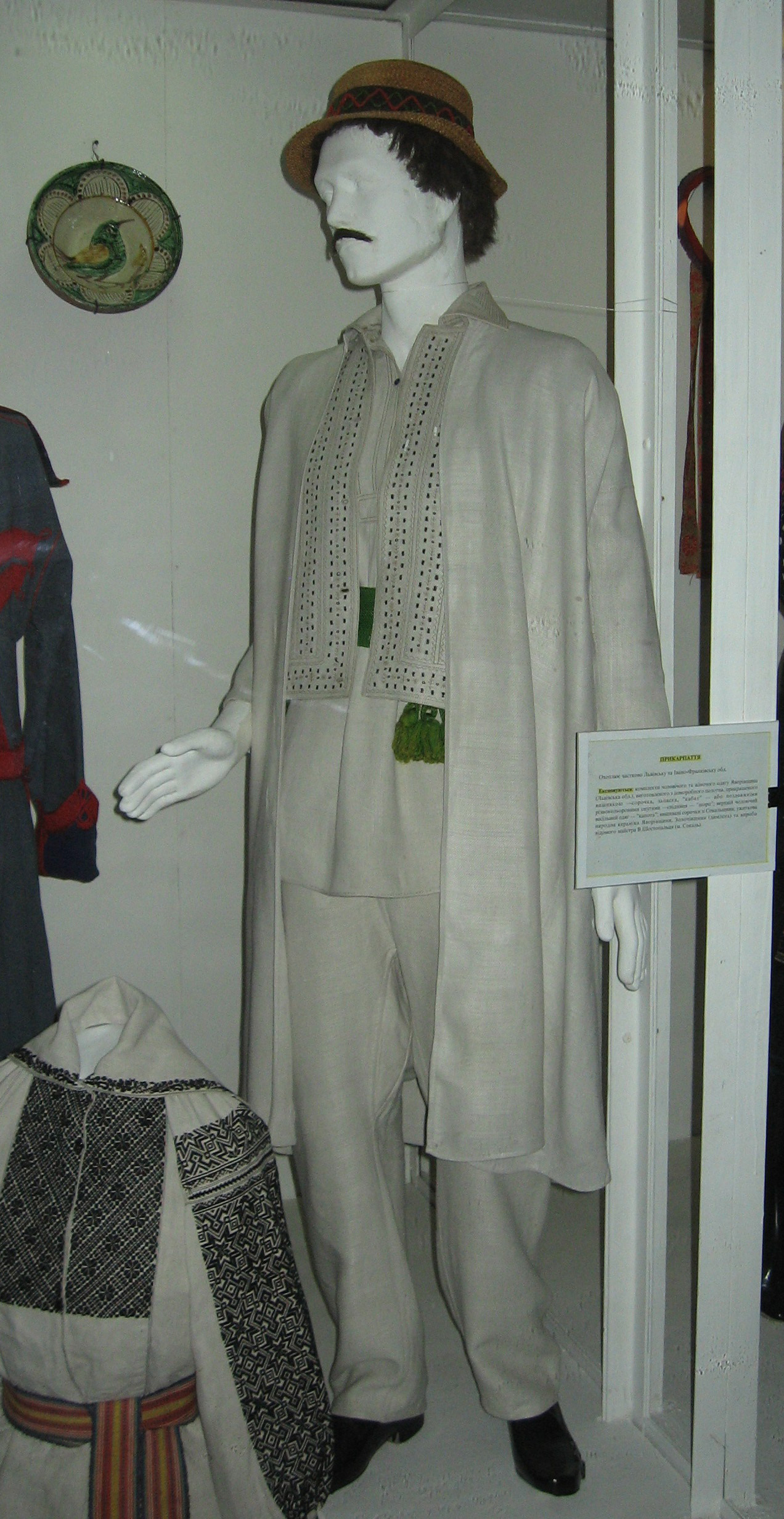 Мужской наряд, Галиция Мужской наряд, Галиция, Яворовщина, из собрания музея этнографии во Львове